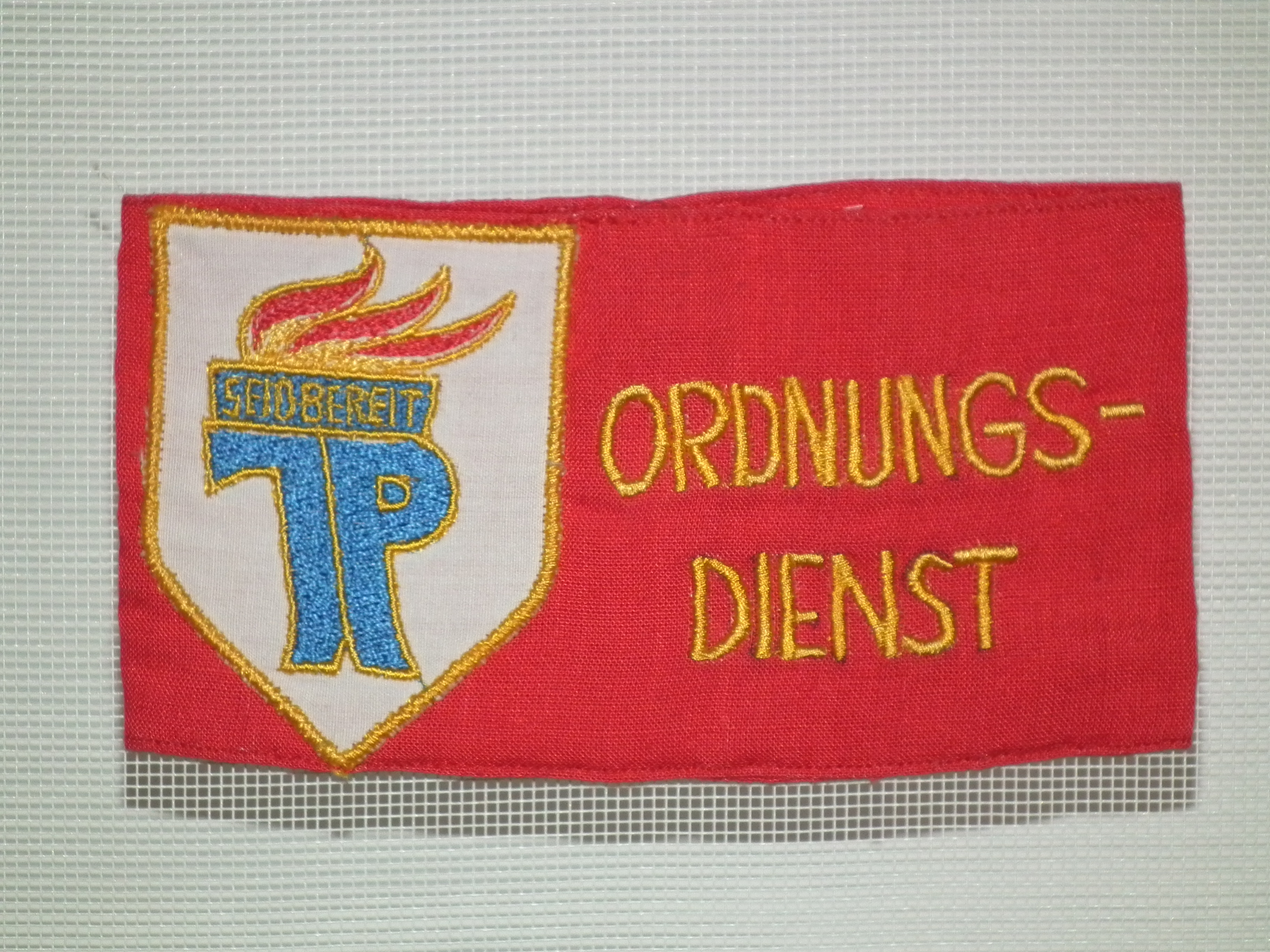 Industriemuseum Chemnitz, Jungpioniere, Ordnungsdienst